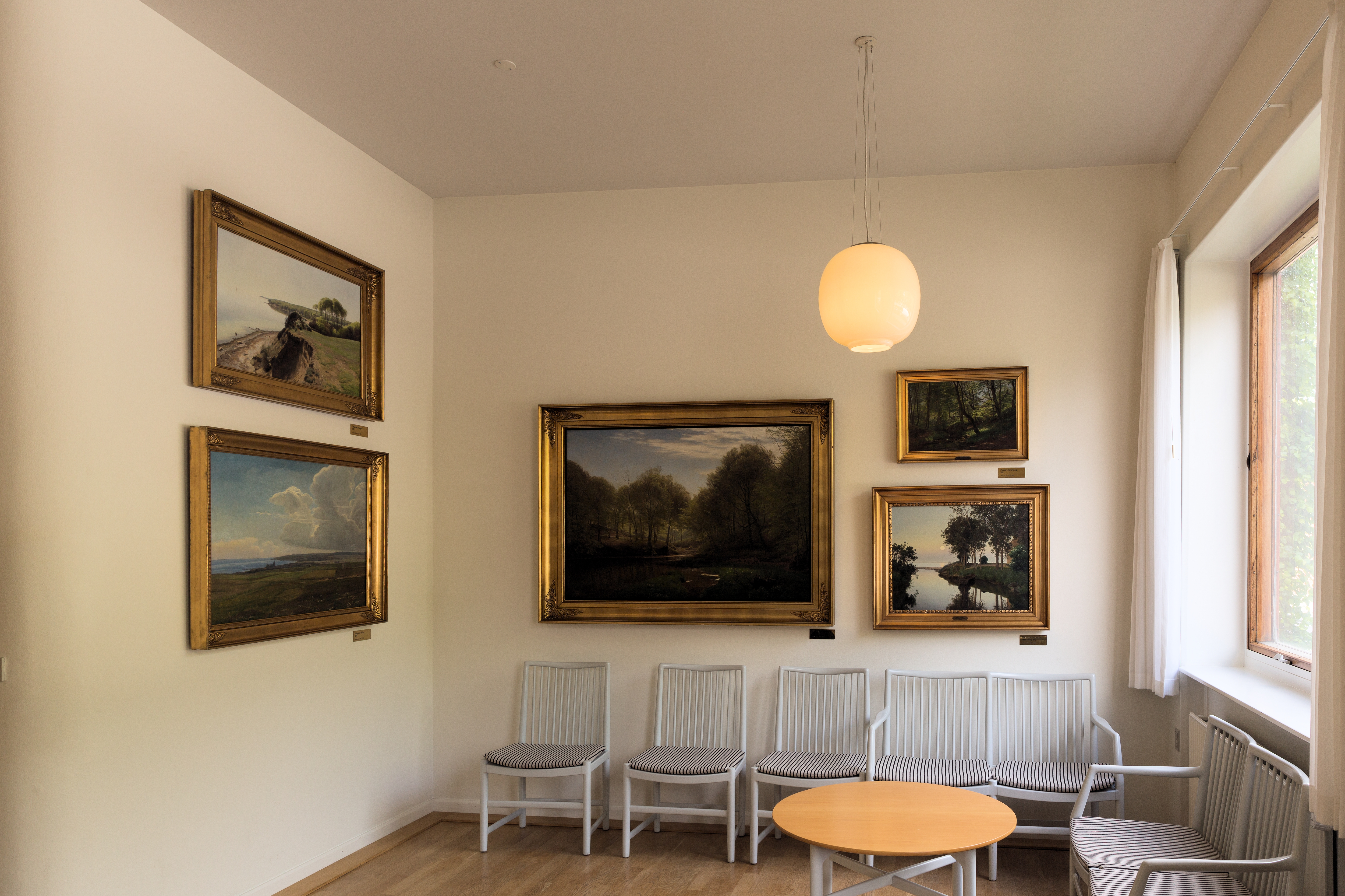 Forværelse til bryllupslokalet på Aarhus Rådhus